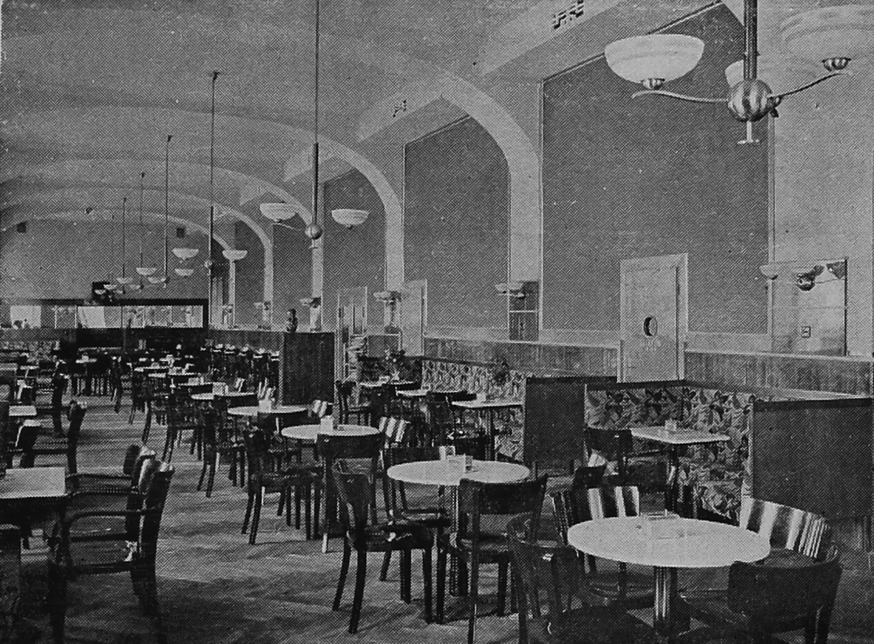 Fotografie interiéru kavárny Alcron v Hotelu Padowetz v Brně, foceno roku 1935 po přestavbě architektem Othmarem Skrabalem.